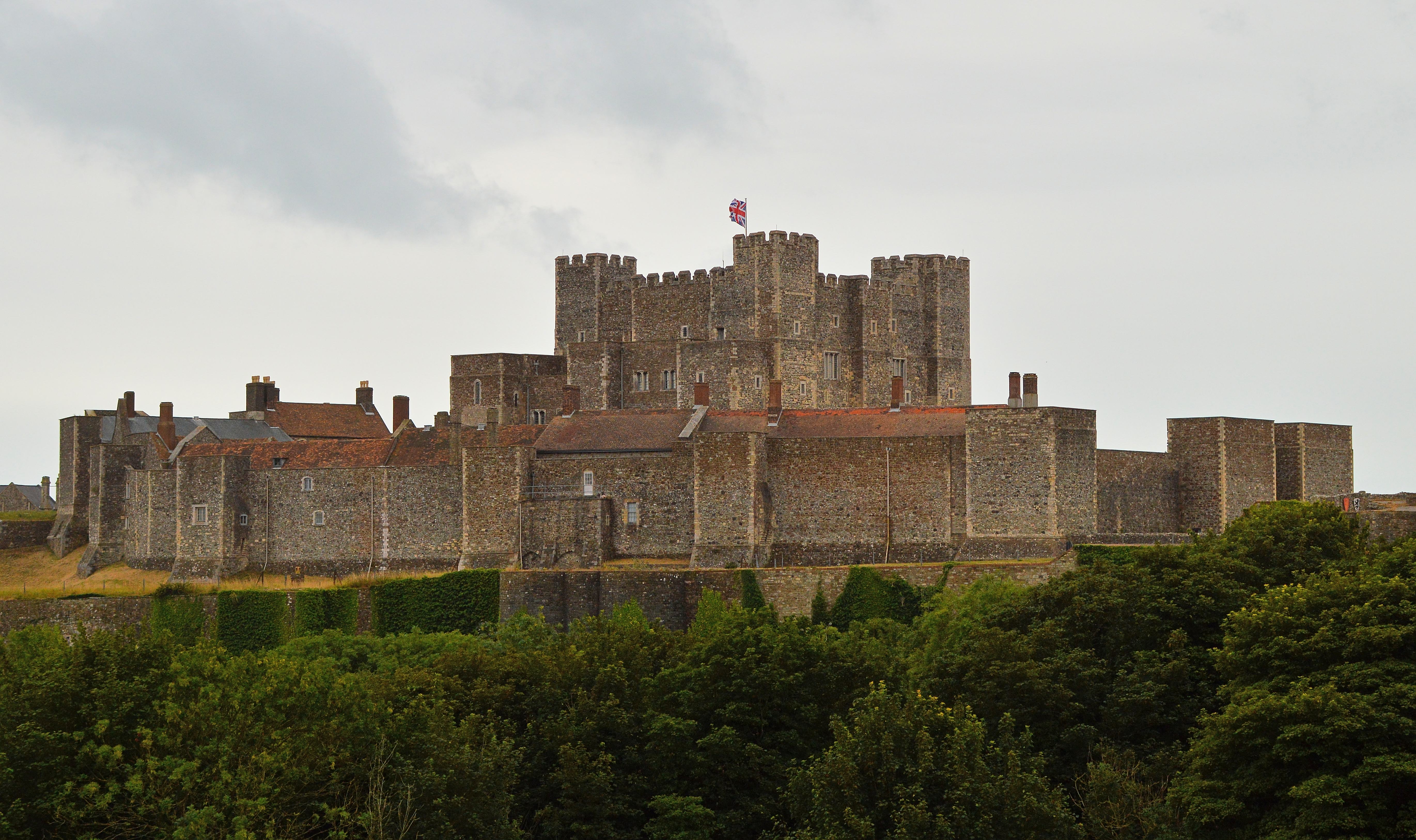 Dover Castle von einem Parkplatz im Norden aus, 2018.